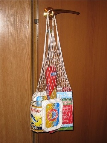 Авоська